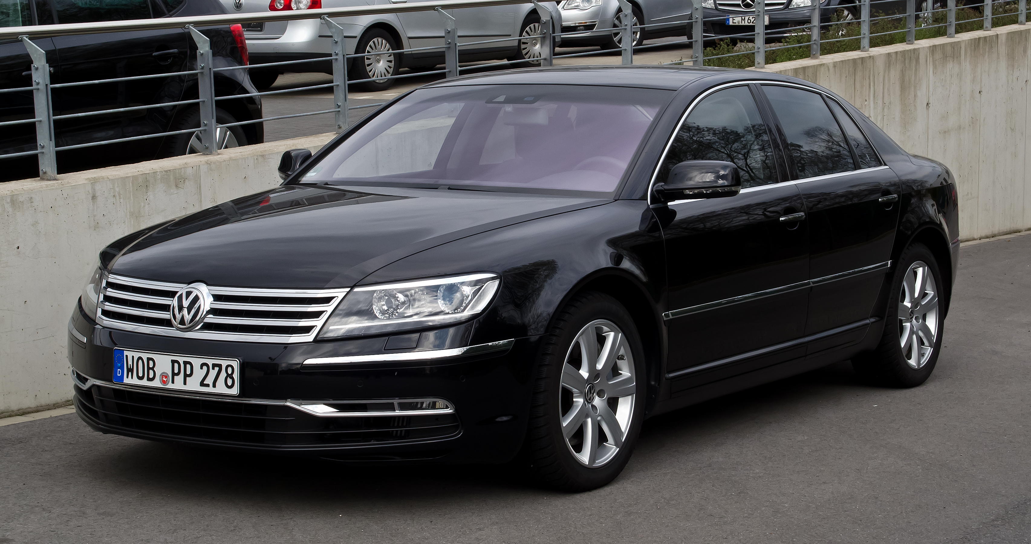 VW Phaeton 3.0 V6 TDI 4MOTION (2. Facelift)